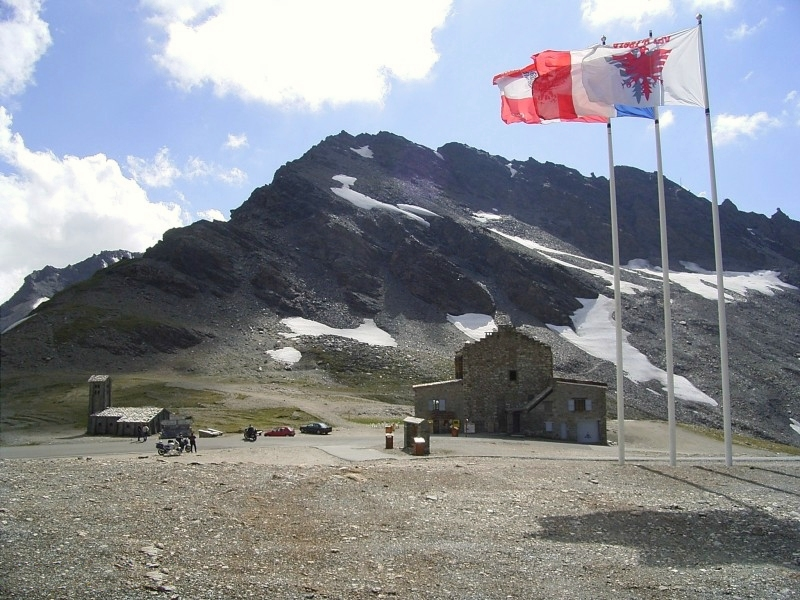 Blick auf den Col de l'Iseran vom etwas höher gelegenen Parkplatz aus, dahinter die Pointe des Lessieres (3043m)